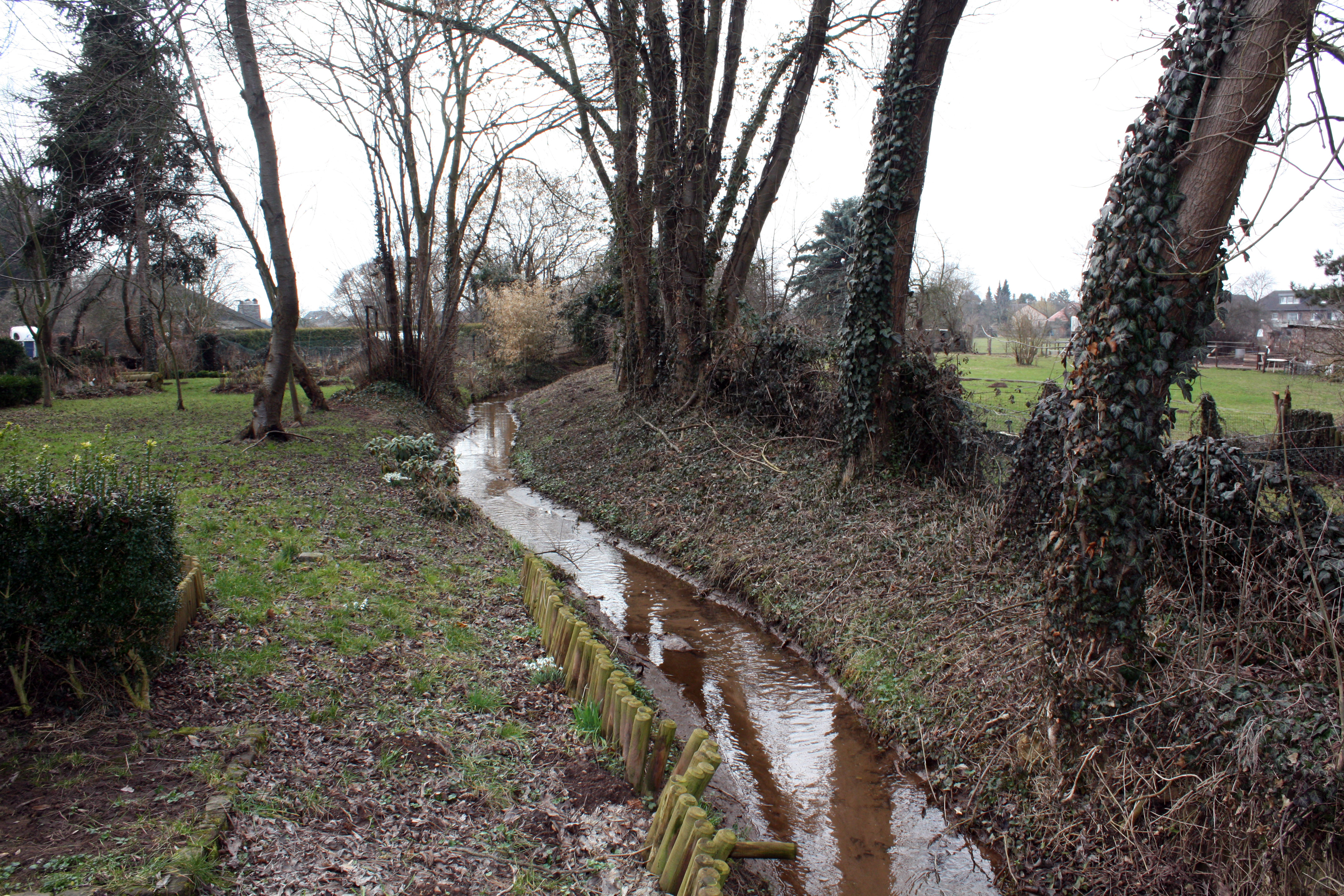 Lechenich Oebelsmühle. Mühlenbach hinter dem Maschinenhaus